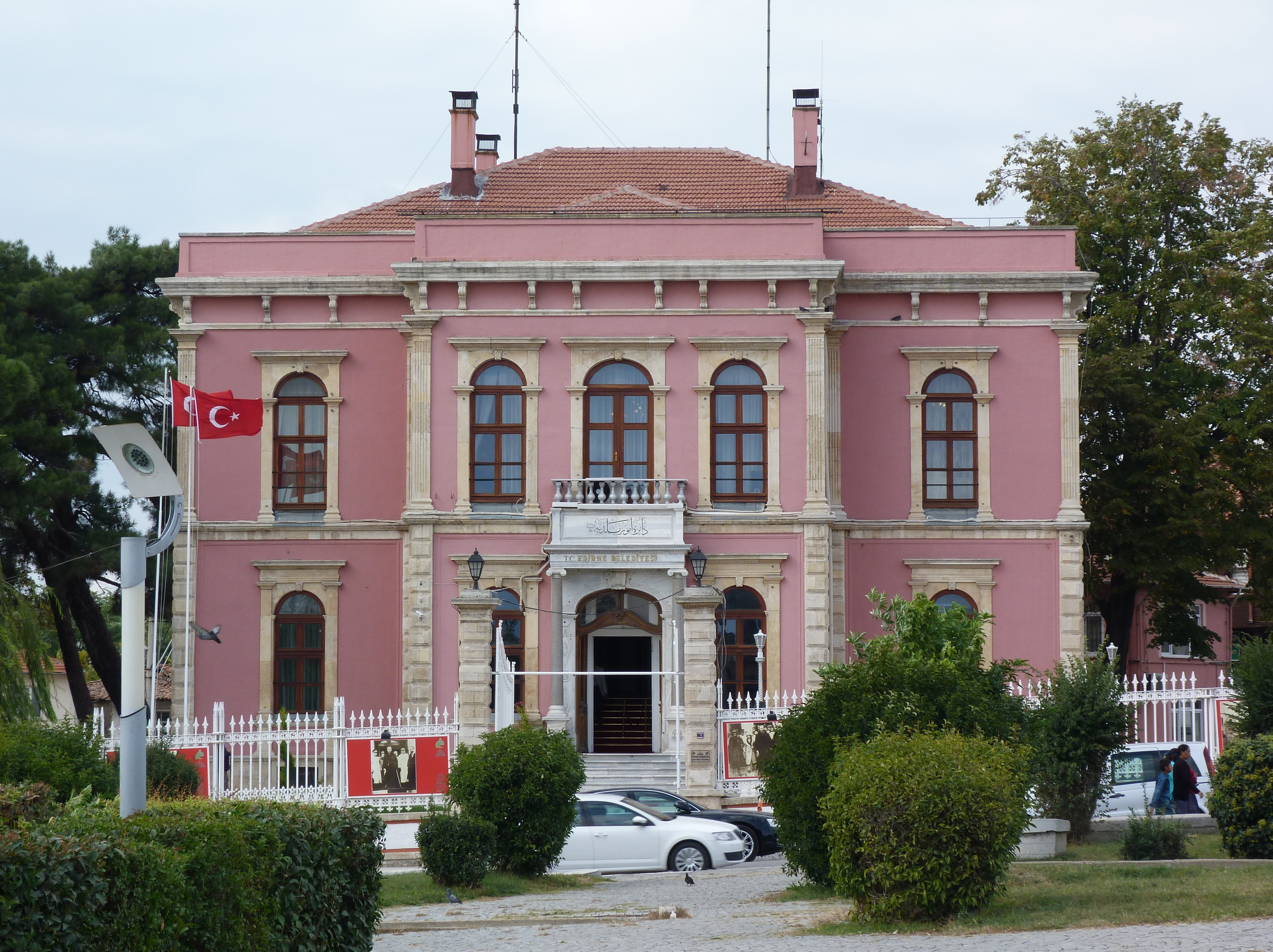 A felvétel 2014. október 22-én kedden készült Edirnében. ©© Derzsi Elekes Andor, Budapest, 2014, A kép egészben, vagy részletekben másolását, bármilyen úton történő sokszorosítását és felhasználását a szerző ellenérték nélkül, jogutódjaira is kihatóan megengedi. Az engedély kiterjed a kereskedelmi célú hasznosításra is. Kéri azonban nevének feltüntetését a felhasználás során. A Metapolisz sorozat valamennyi képe és filmje Creative Commons alatti valamint kereskedelmi - for profit - célra is felhasználható. Ajánlott hivatkozás: Derzsi Elekes Andor: Metapolisz DVD line